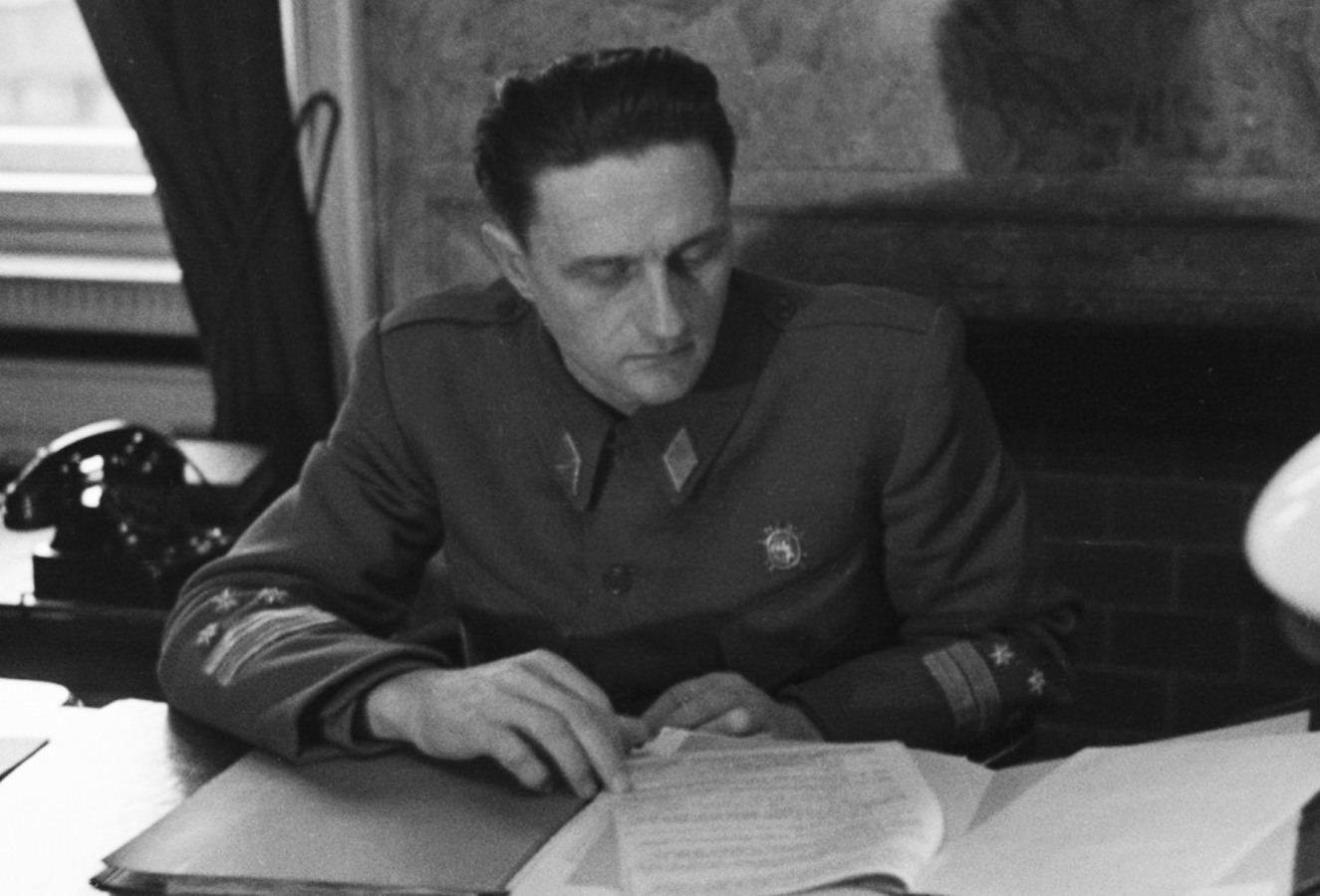 Srpski (latinica): Todor Vujasinović Toša (Tešanj, 16. oktobar 1904 — Beograd, 25. mart 1988), učesnik Narodnooslobodilačke borbe, društveno-politički radnik SR Bosne i Hercegovine i SFR Jugoslavije i junak socijalističkog rada.